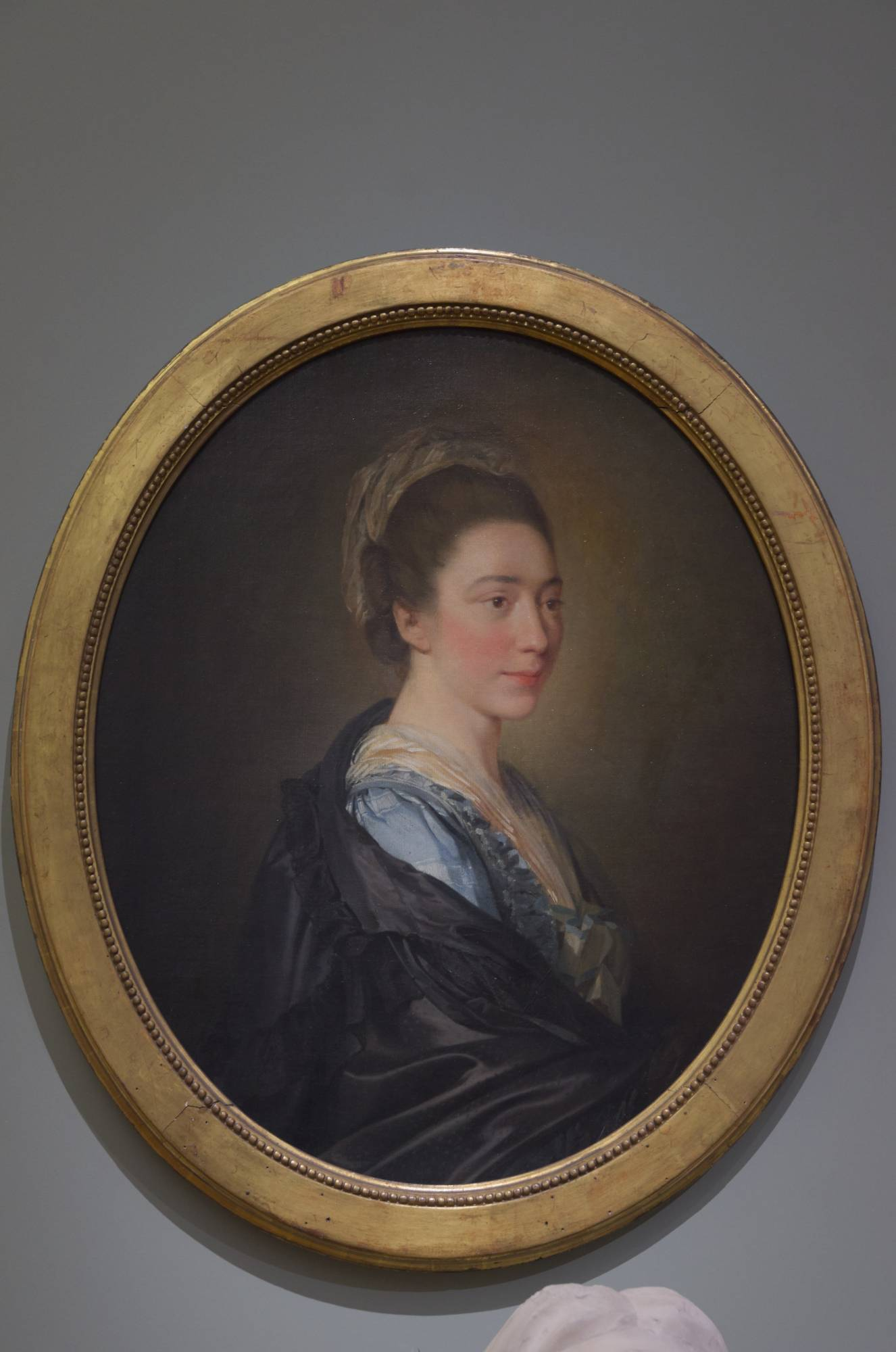 Portrait de Marie-Anne Collot par Pierre-Etienne Falconet, 1773.